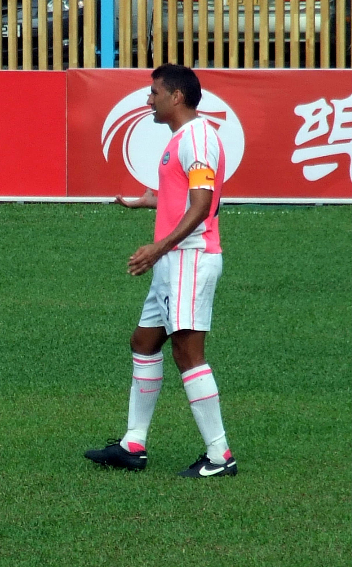 中文（香港）: 高尼路 - 大埔 VS 晨曦